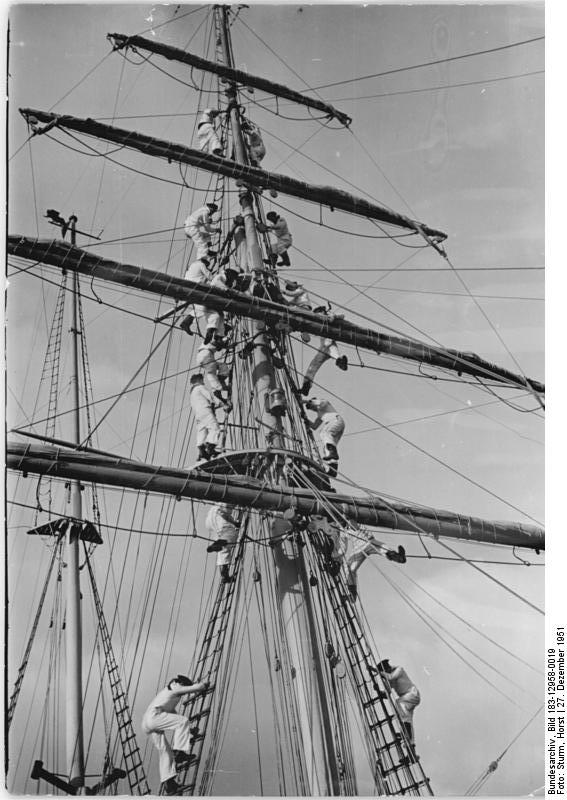 Segelschulschiff "Wilhelm Pieck", Besatzung auf Mast Segelschulschiff "Wilhelm Pieck" Die zukünftigen Kapitäne, Steuerleute und Maate unserer Handelsflotte werden auf der schmucken Zweimaster-Schonerbrigg "Wilhelm Pieck" in einem 10-wöchigen Lehrgang ausgebildet. Die Schüler, die aus allen Teilen der DDR kommen und der Interessengemeinschaft für Wassersport der Freien Deutschen Jugend angehören, lernen unter Anleitung des erfahrenen Kapitäns Weitendorf, der vier Offiziere und einer 10-köpfigen Stammannschaft mit grosser Begeisterung die Bedienung des Segelschiffes. Sie wissen, dass der Tag eines einheitlichen Deutschlands nicht mehr fern ist und freuen sich darauf, mit unseren Handelsschiffen alle Meere befahren zu können. Was sie gelernt haben, werden sie dann erst richtig beweisen können. UBz: Das Aufentern ist bei hohem Seegang nicht einfach. Mut und Geschicklichkeit gehören dazu, die Segel am Fockmast zu lösen. Zentralbild-Sturm 27.12.1951